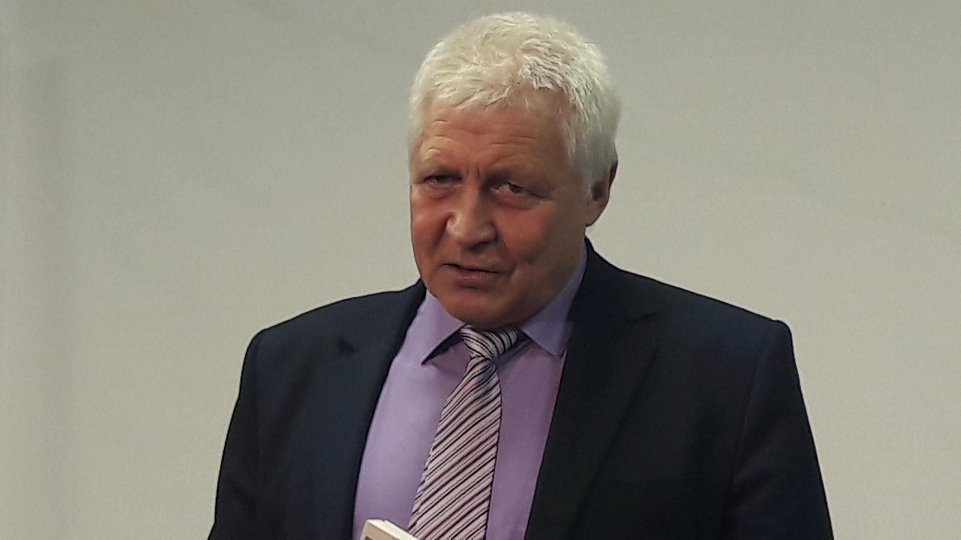 Сябра Саюзу Беларускіх пісьменьнікаў